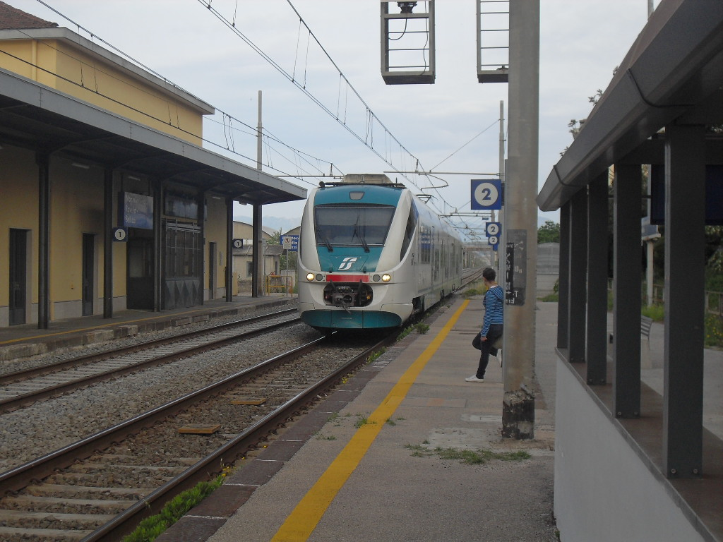 Autore: Frusciante Davide Nessun copyright